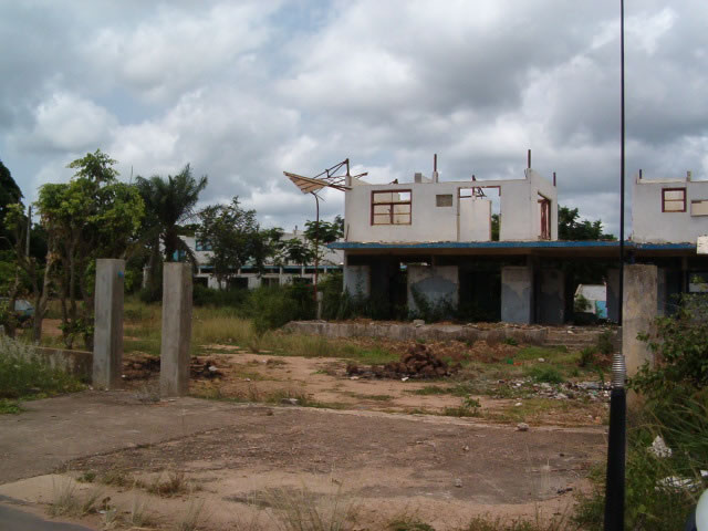 Centre Médico-scolaire et dispensaire urbain de Bouaké (Côte d'Ivoire) détruits par la guerre.